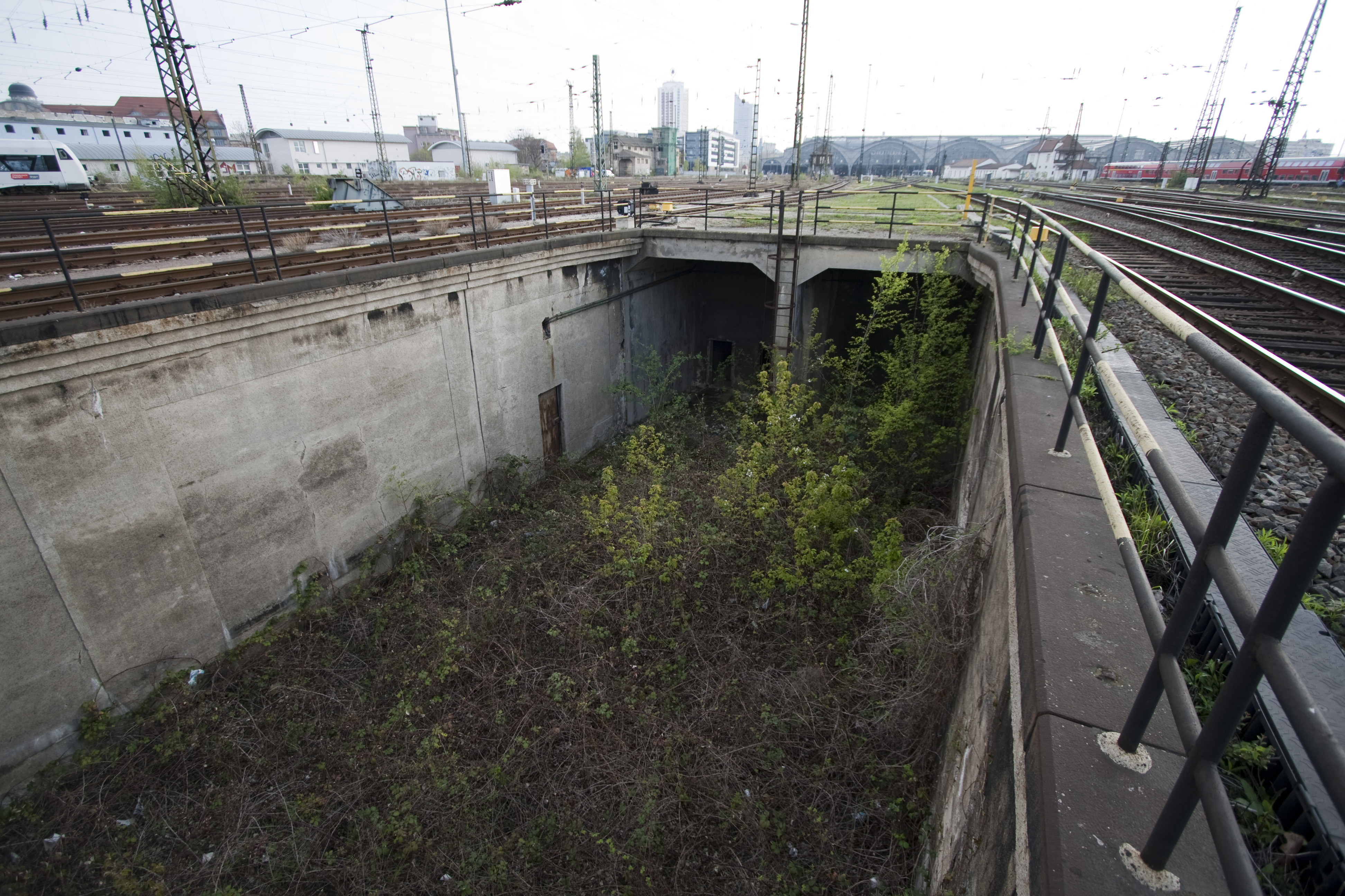 Einfahrsportal Nord - Untergrundbahn Leipzig